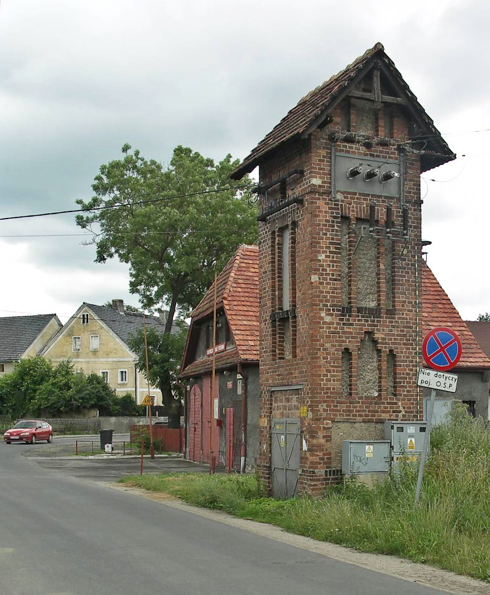 Remiza ochtniczej straży pożarnej i budynek trafostacji.